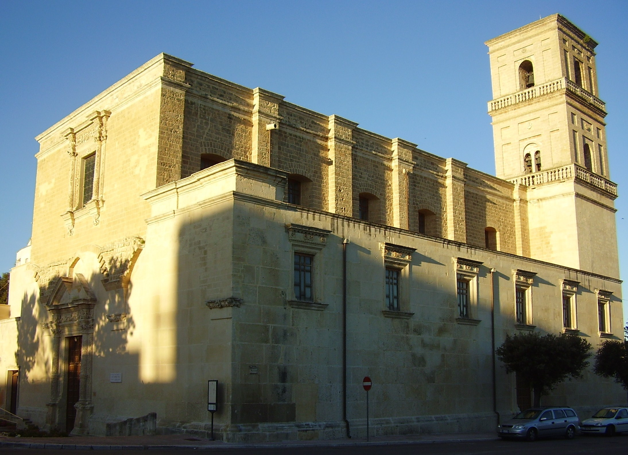 Chiesa Parrocchiale di San Biagio, già di Santa Caterina Novella, Galatina, Lecce